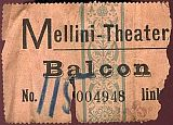 Eintrittskarte fürs Mellini-Theater, Saison 1906/07